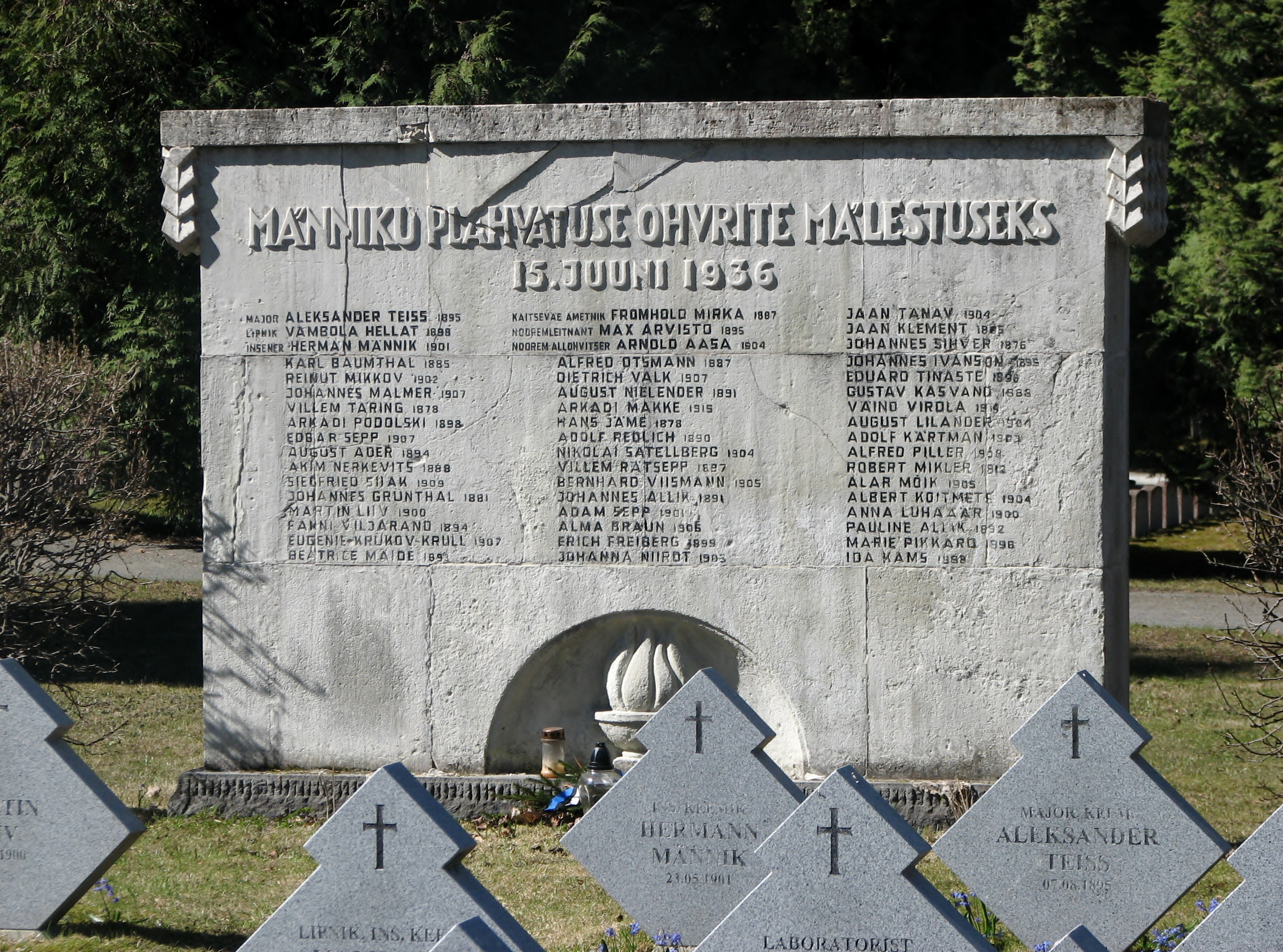 Männiku plahvatuse ohvrite mälestusmärk Siselinna kalmistu kaitseväe osas